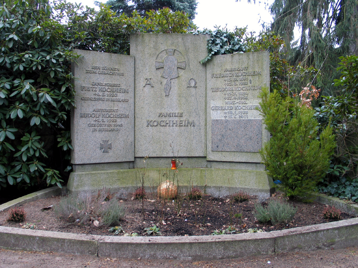 Grabmal der Familie um Friedrich Kochheim auf dem Neuen St. Nikolai Friedhof in Hannover, Stadtteil Nordstadt ...